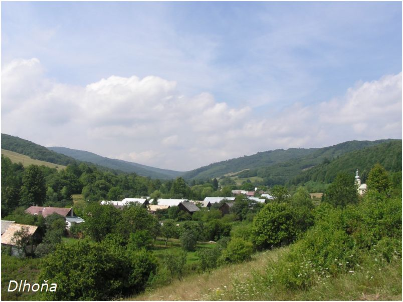 Celkový pohľad na Dlhoňu